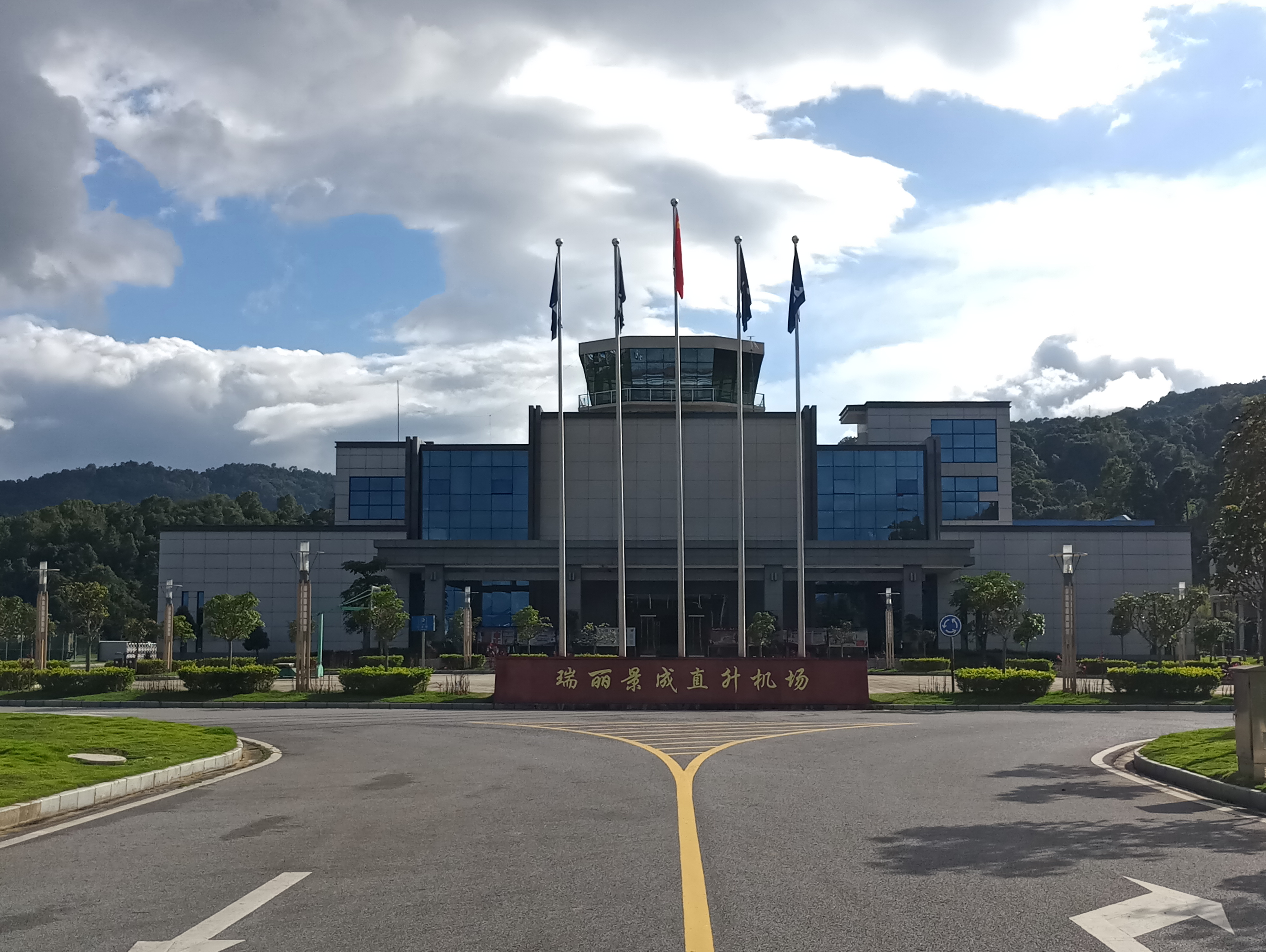 中文（中国大陆）: 景成直升机场-航站楼